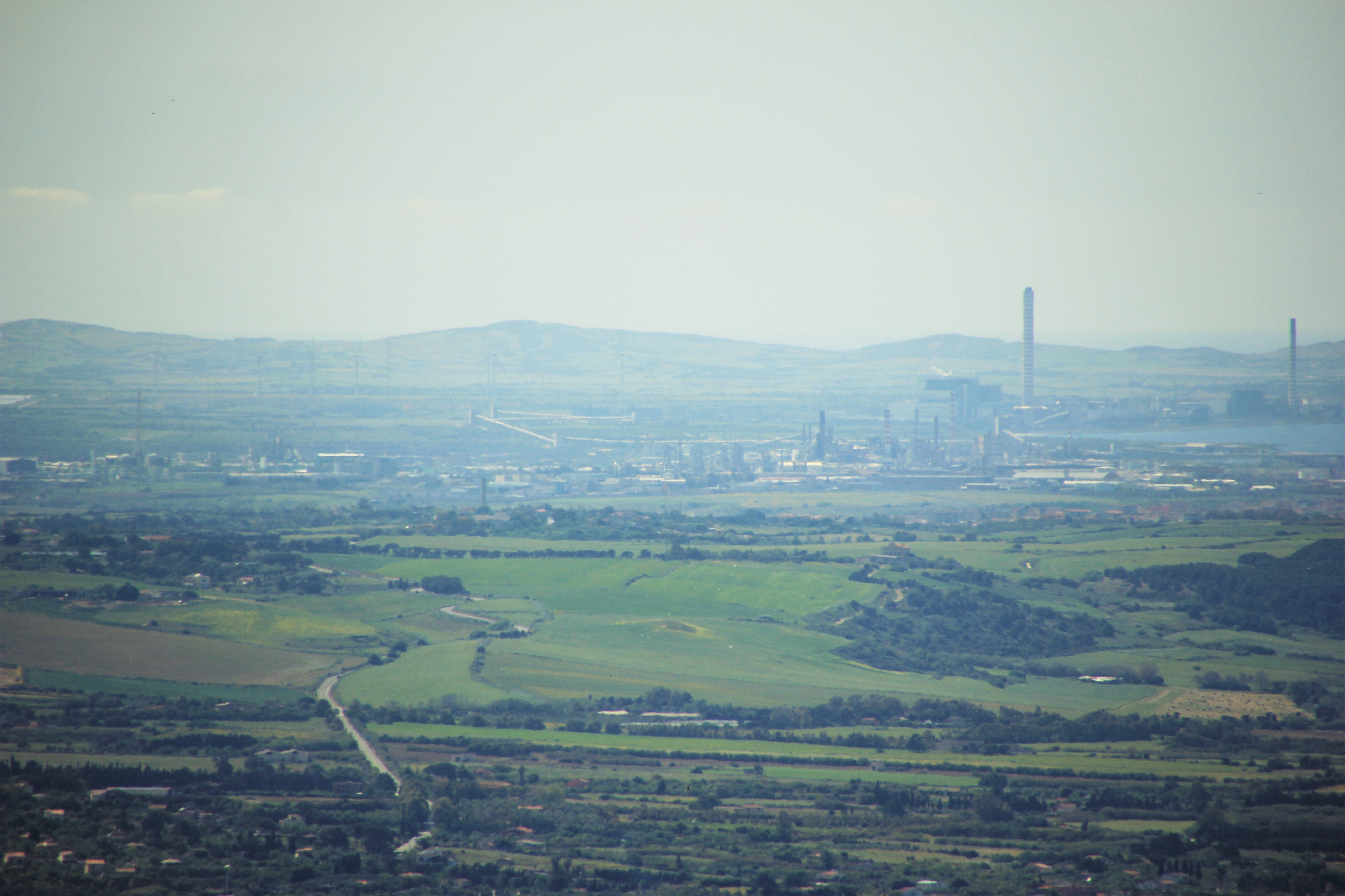 Porto Torres - Zona industriale